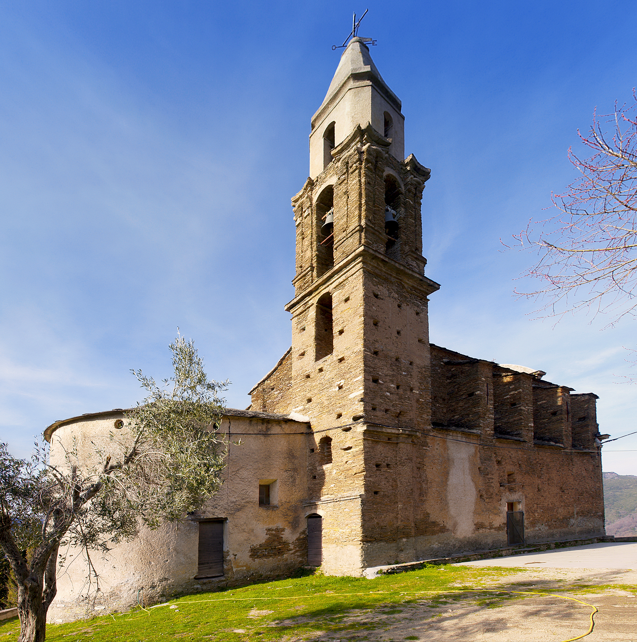 Ficaja - Eglise de l'Immaculée Conception